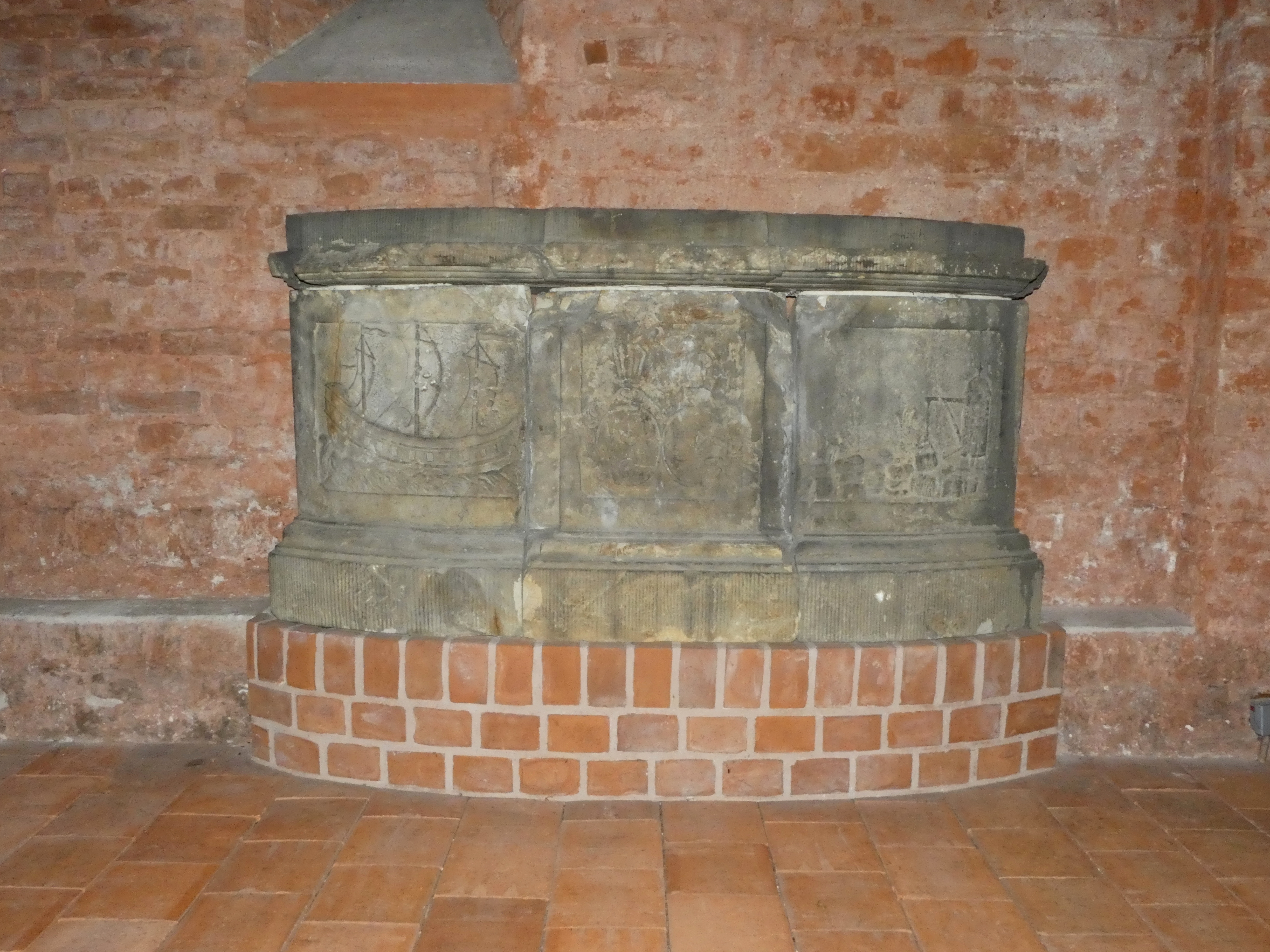 Reliefstein St. Nikolai, Brandenburg